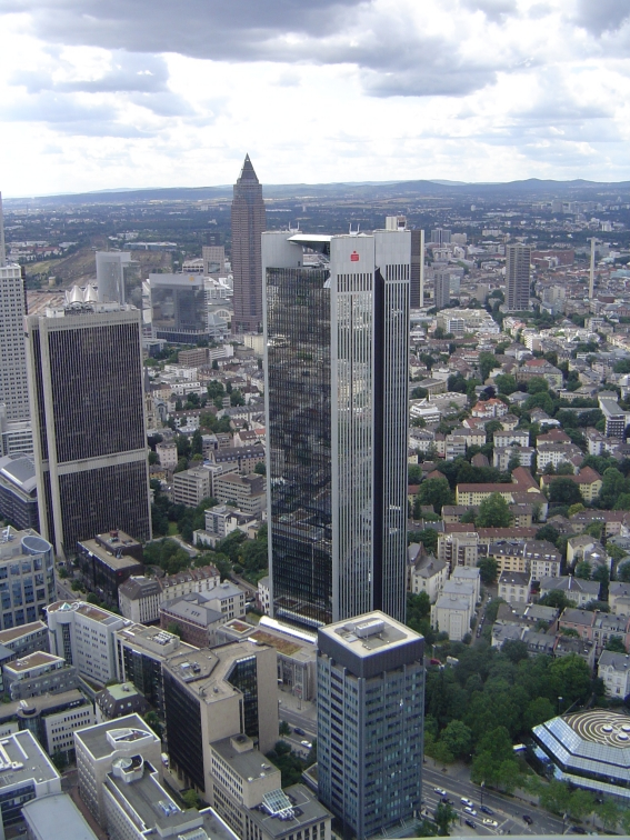 Beschreibung: Trianon Gebäude in Frankfurt am Main Quelle: selbst fotografiert Fotograf: O. Stapf "Credibility" Datum: Juli 2005 Foto: Digitalbild (größere Auflösung vorhanden)